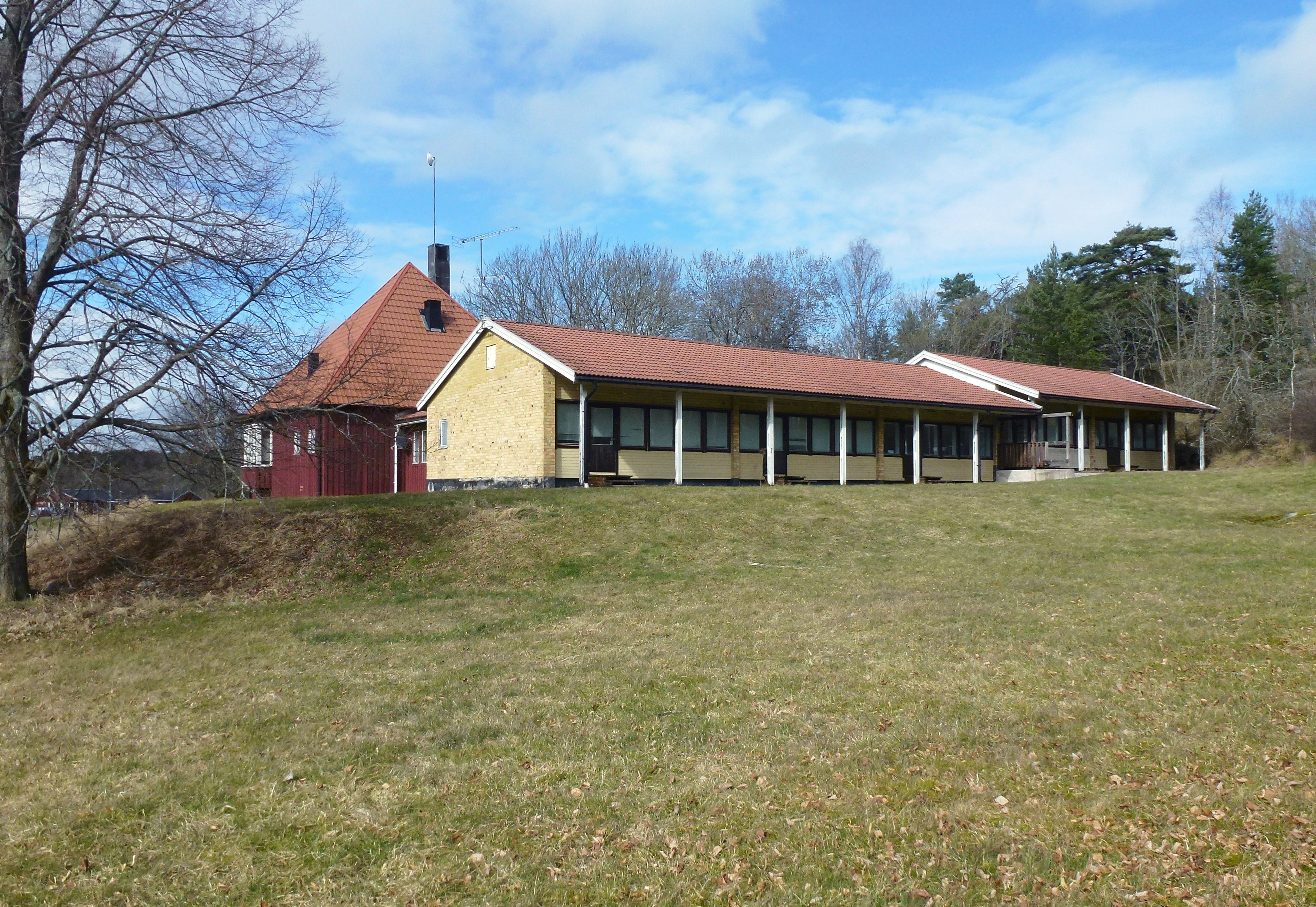 Skå barnby, f.d. skola